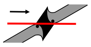 火器弾薬技術ハンドブック 2012年改訂版 p214 より、空間装甲における侵徹穴角部の効果